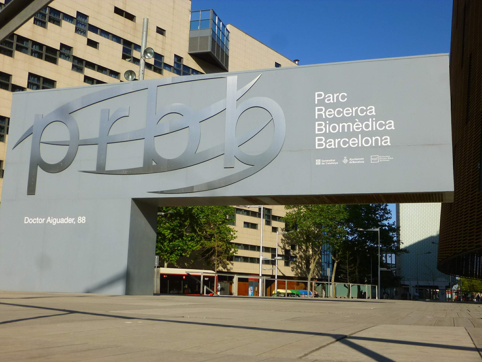 Parque de Investigación Biomédica de Barcelona (PRBB), Campus Universitari Mar (UPF)